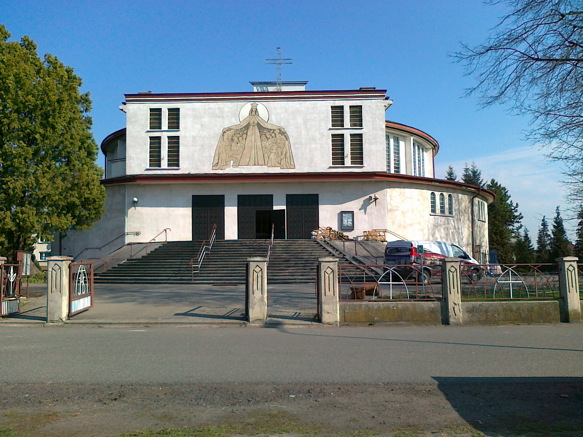 Kościół Najświętszej Maryi Panny Królowej Świata w Kędzierzynie-Koźlu